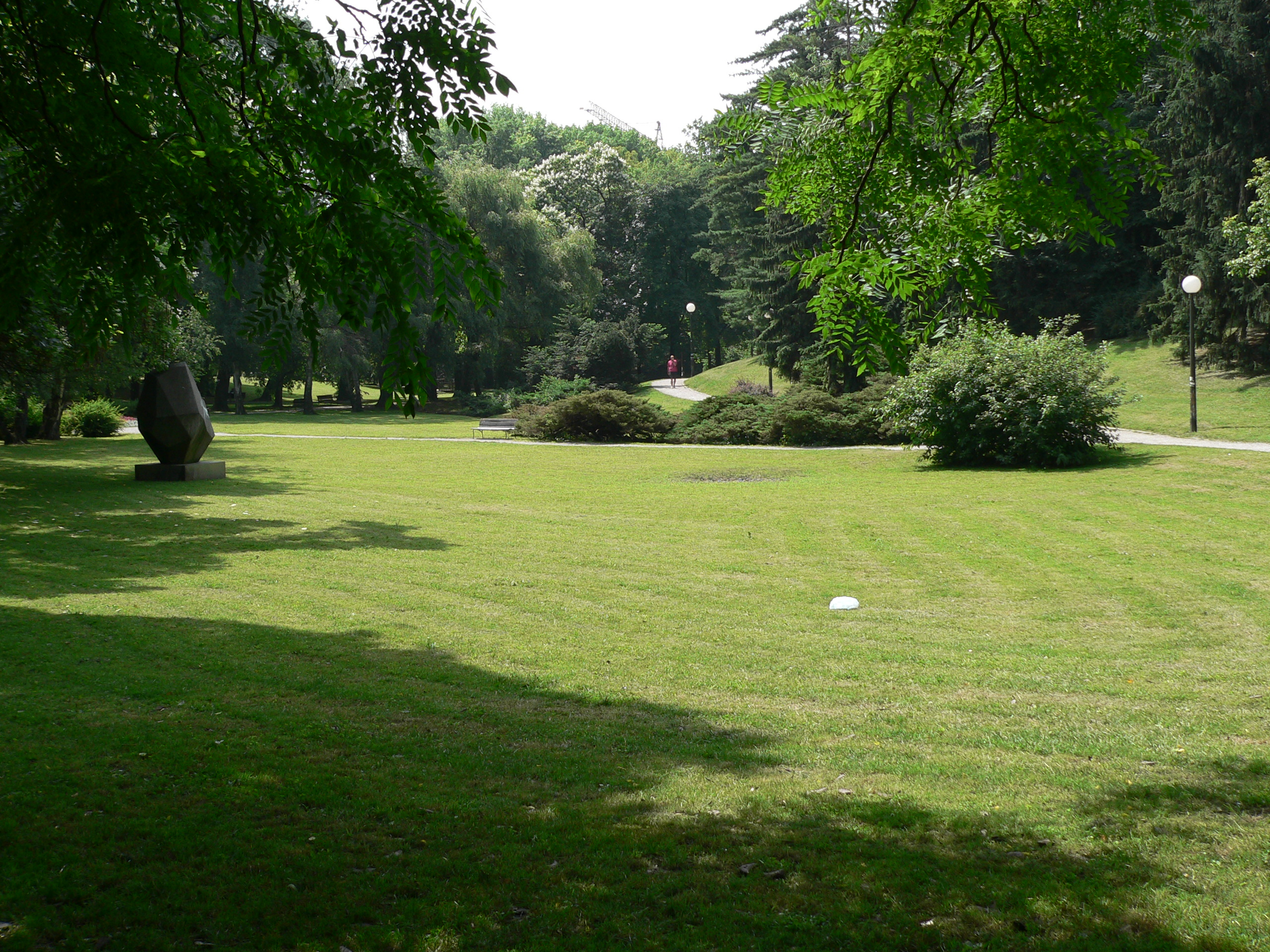 Park Ribnjak in Zagreb